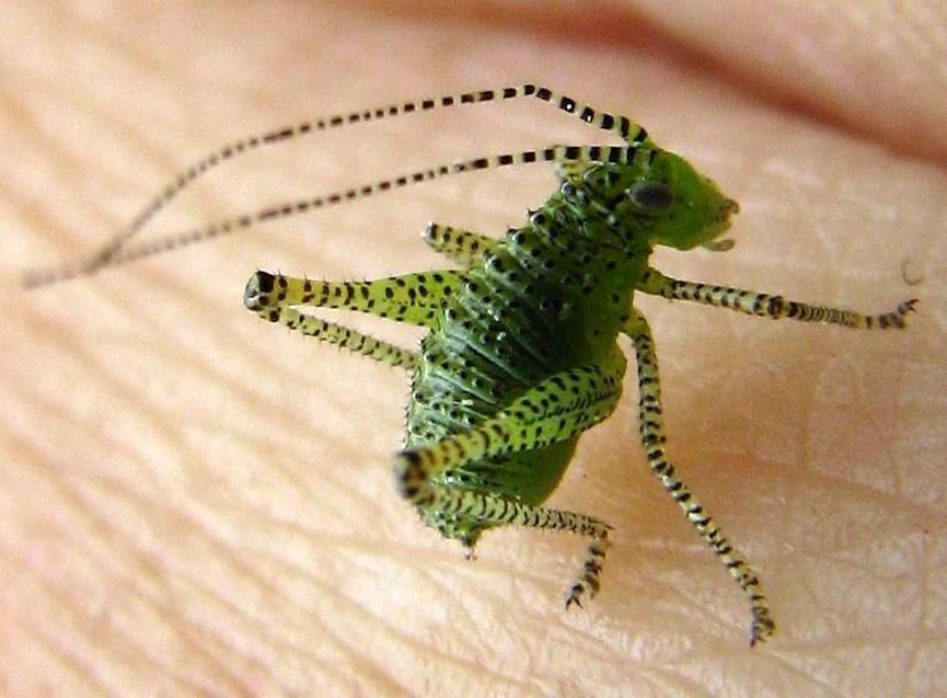 Prikkene hos sabelgresshoppe Leptophyes punctatissima er mest fremtredende når de er unge.Template:Byline